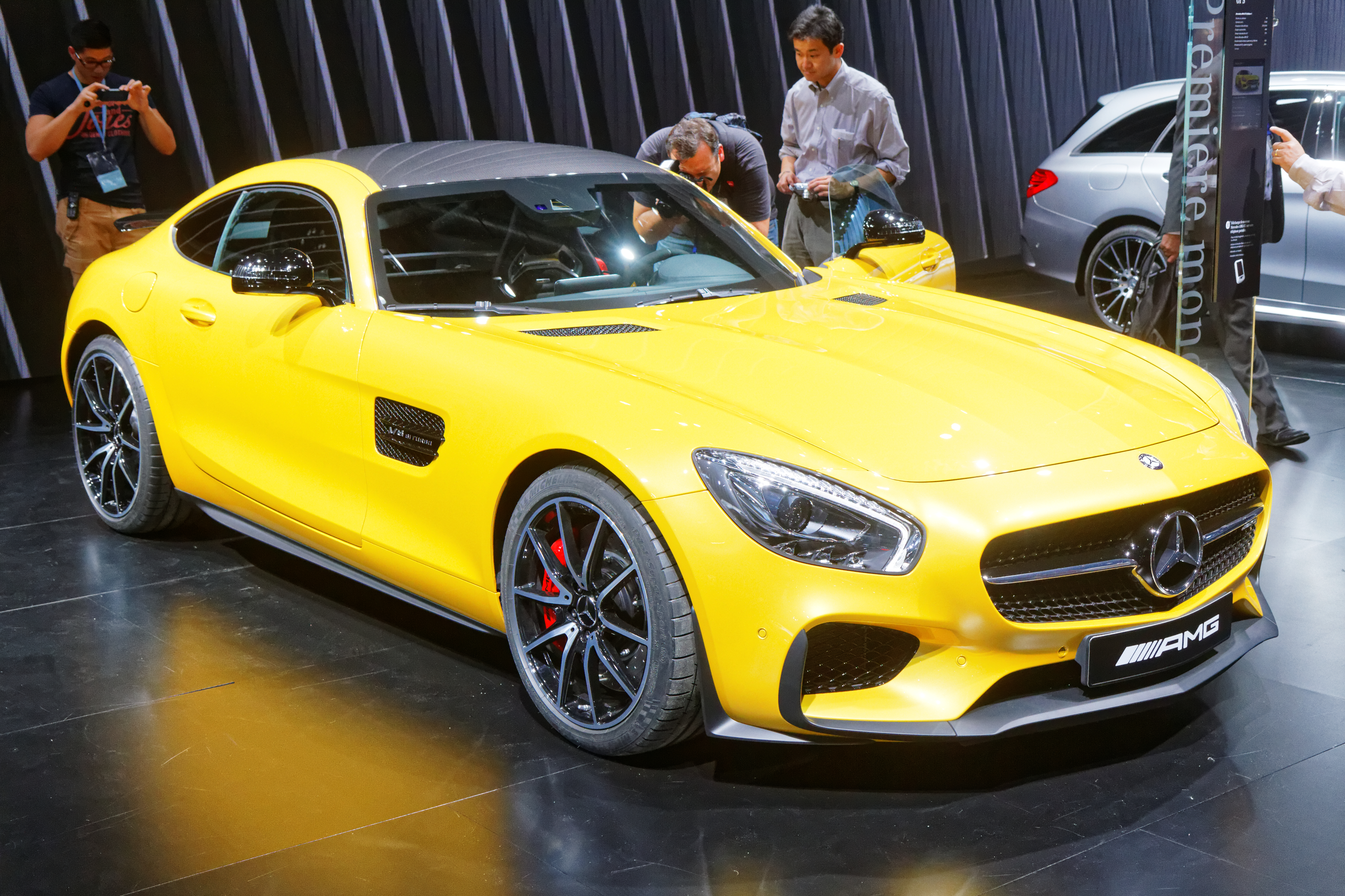 Une Mercedes AMG GT présentée lors du mondial de l'automobile de Paris 2014.